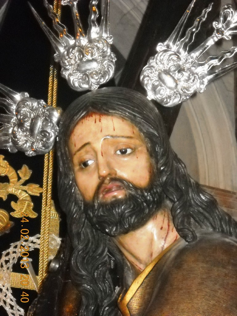 Cristo de la Corona, titular de la Hermandad homónima de Sevilla